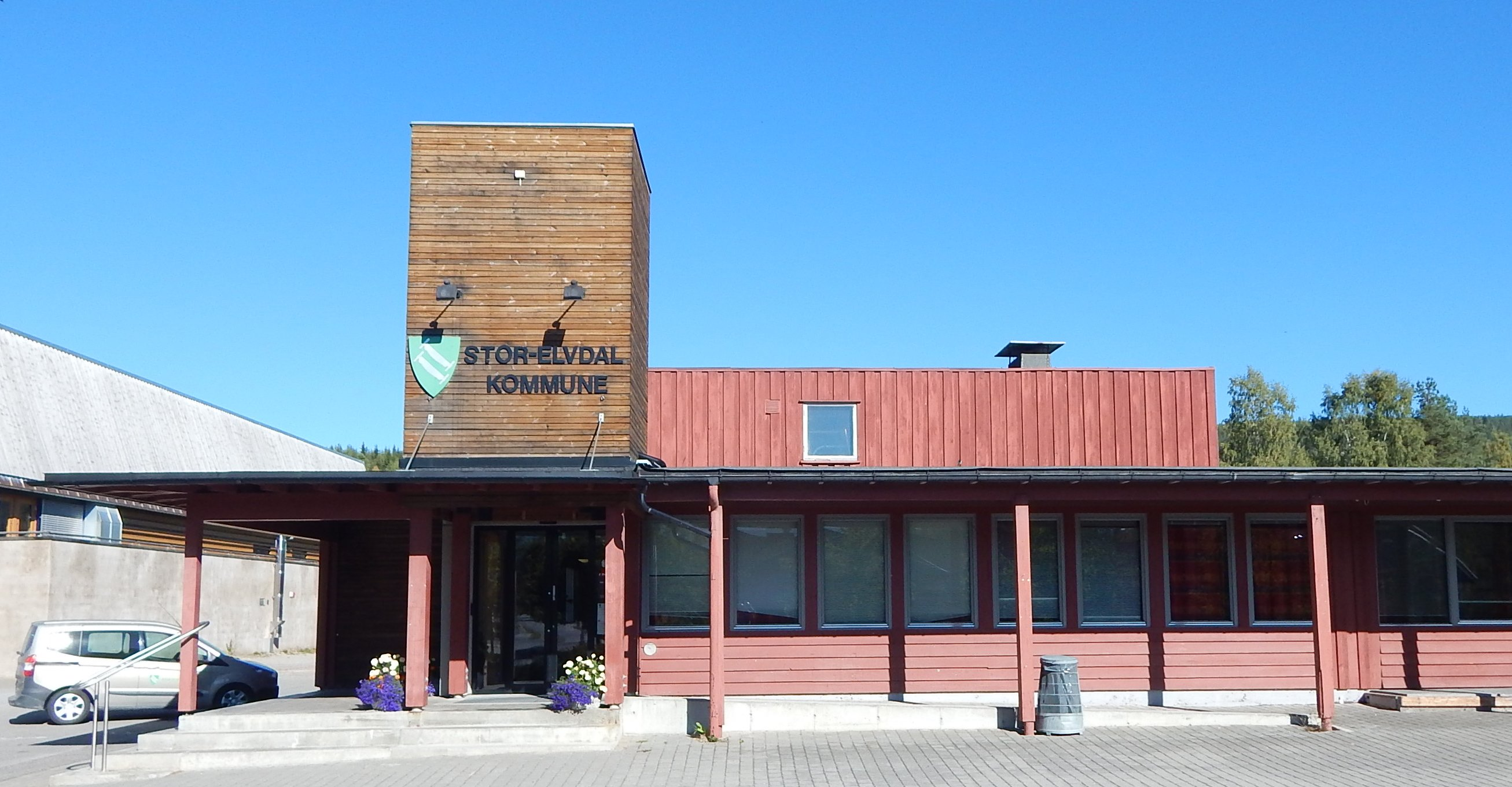 Stor-Elvdal kommunehus på Koppang